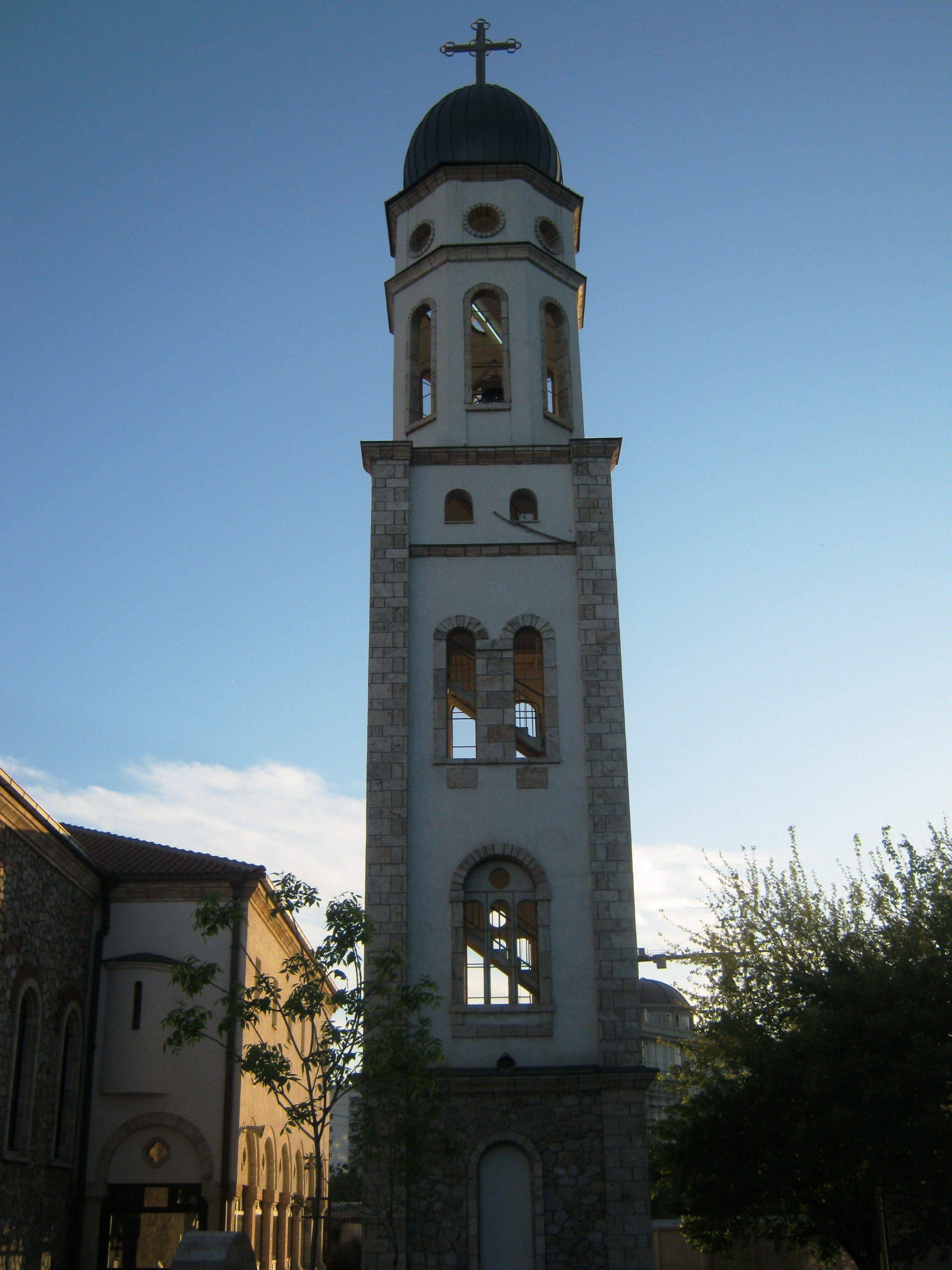 Камбана на црквата св. Богородица во Скопје